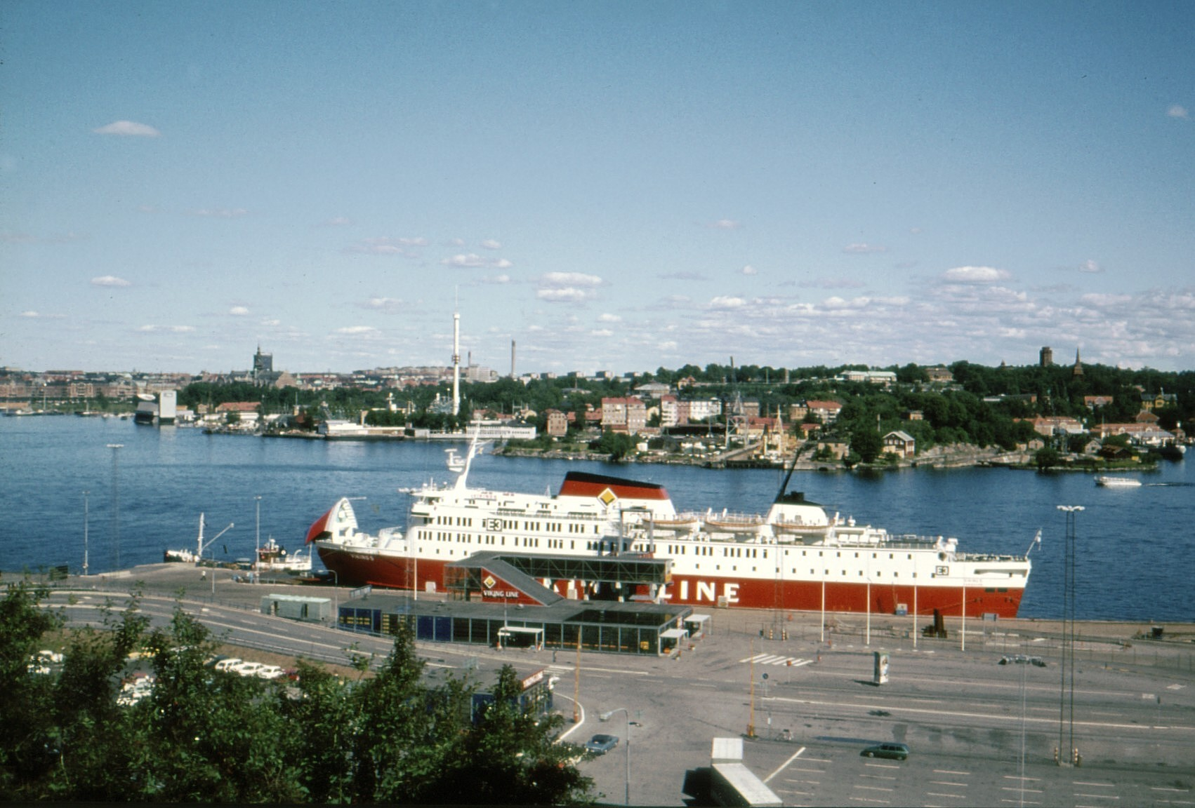 "M/S Viking 5" vid Stadsgården i Stockholm